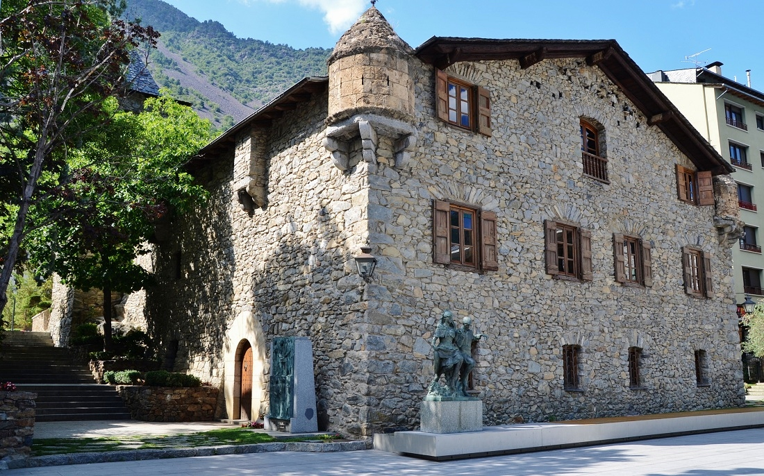 Casa de la Vall